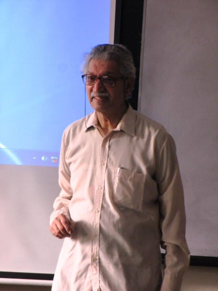 ষষ্ঠ আব্দুল জব্বার জ্যোতির্বিজ্ঞান কর্মশালায় বক্তব্যরত আনোয়ারুর রহমান খান